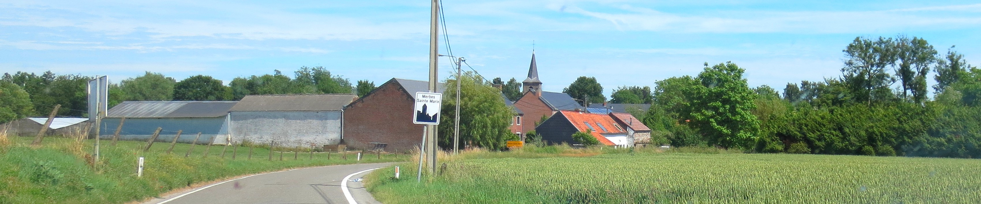 Merbes-Sainte-Marie